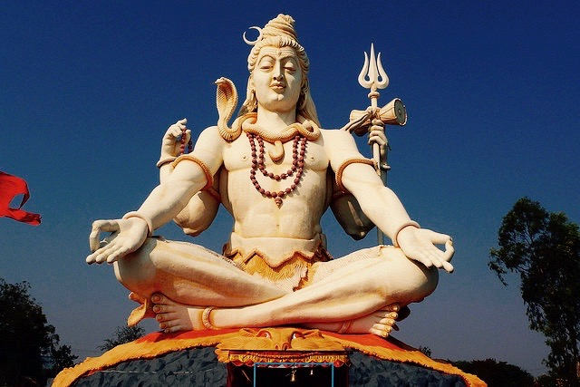 Shiva, Bijapur